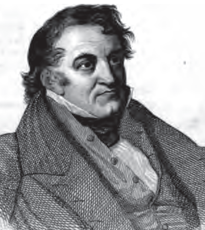 Jean Charles Léonard Simonde de Sismondi